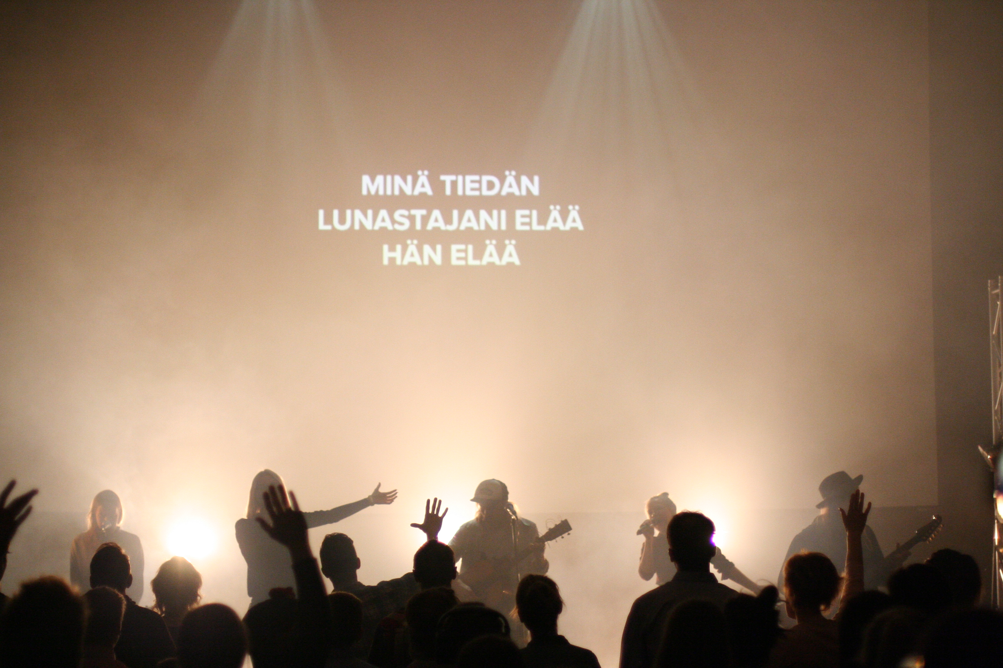 Suhen sunnuntai Kalliossa